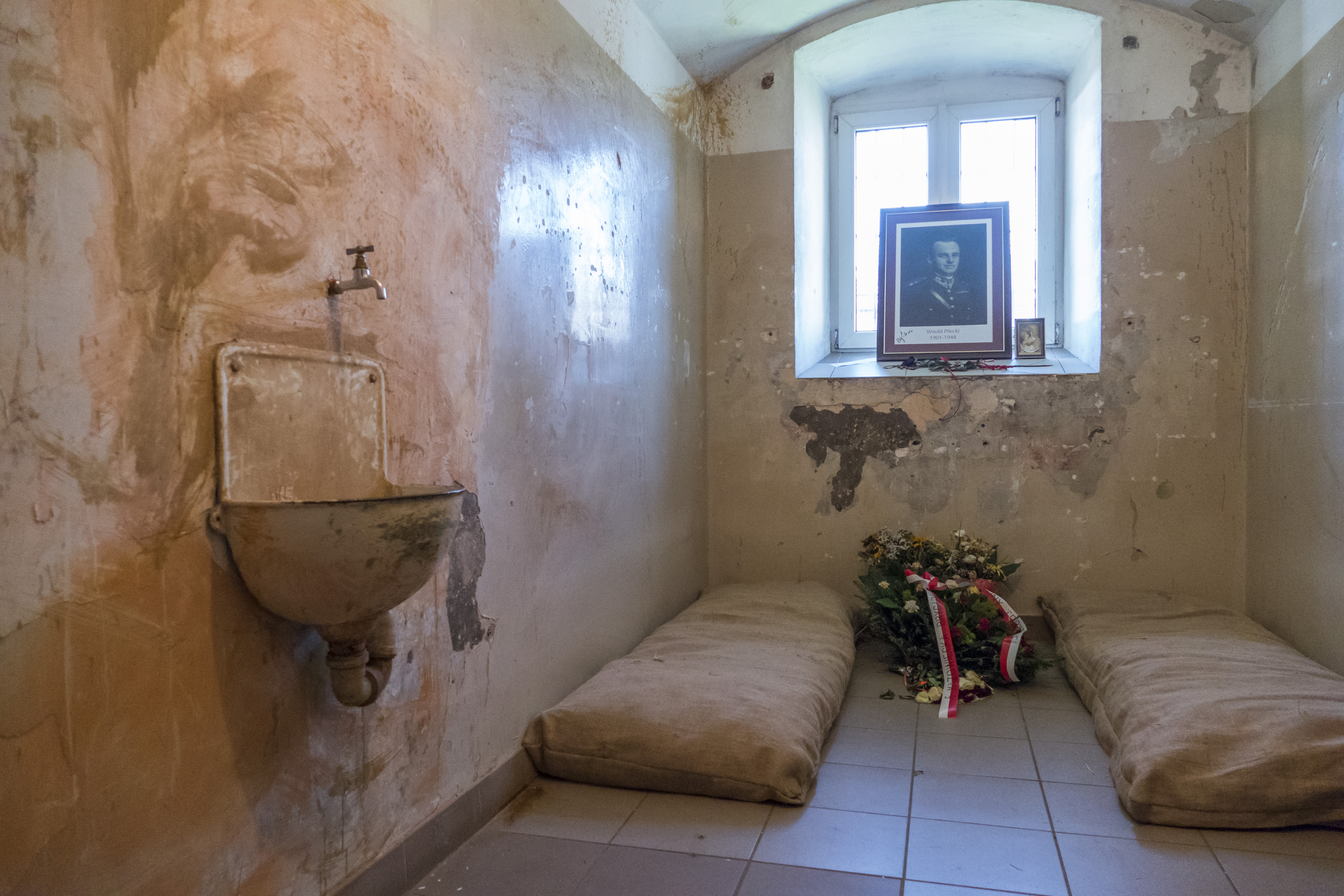 Muzeum Żołnierzy Wyklętych i Więźniów Politycznych PRL w Warszawie, ul. Rakowiecka 37.